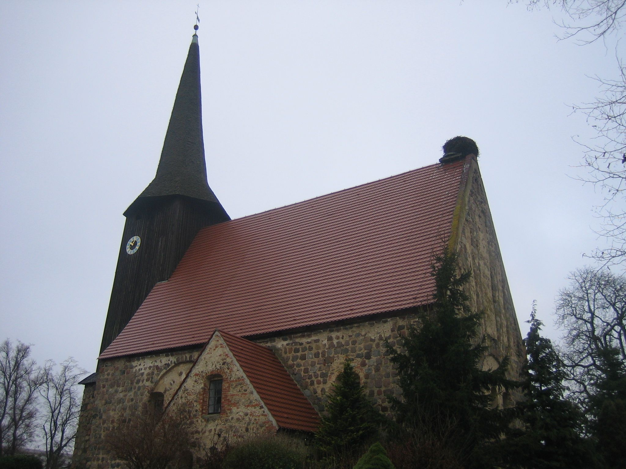 Dorfkirche Cölpin, Landkreis Mecklenburgische Seenplatte Baugeschichte: Findlingsquaderbau aus der zweiten Hälfte des 13. Jahrhunderts Turmbau Ende des 15. Jahrhundert, heutige Gestalt 17. Jahrhundert holzgeschnitzter Flügelaltar 1502 barocker Innenausbau und Kanzelaltar 1792 Innenrenovierung 1990 Turmerneuerung und das halbe Kirchendach (Quelle: Infotafel am Eingang der Kirche, April 1995)